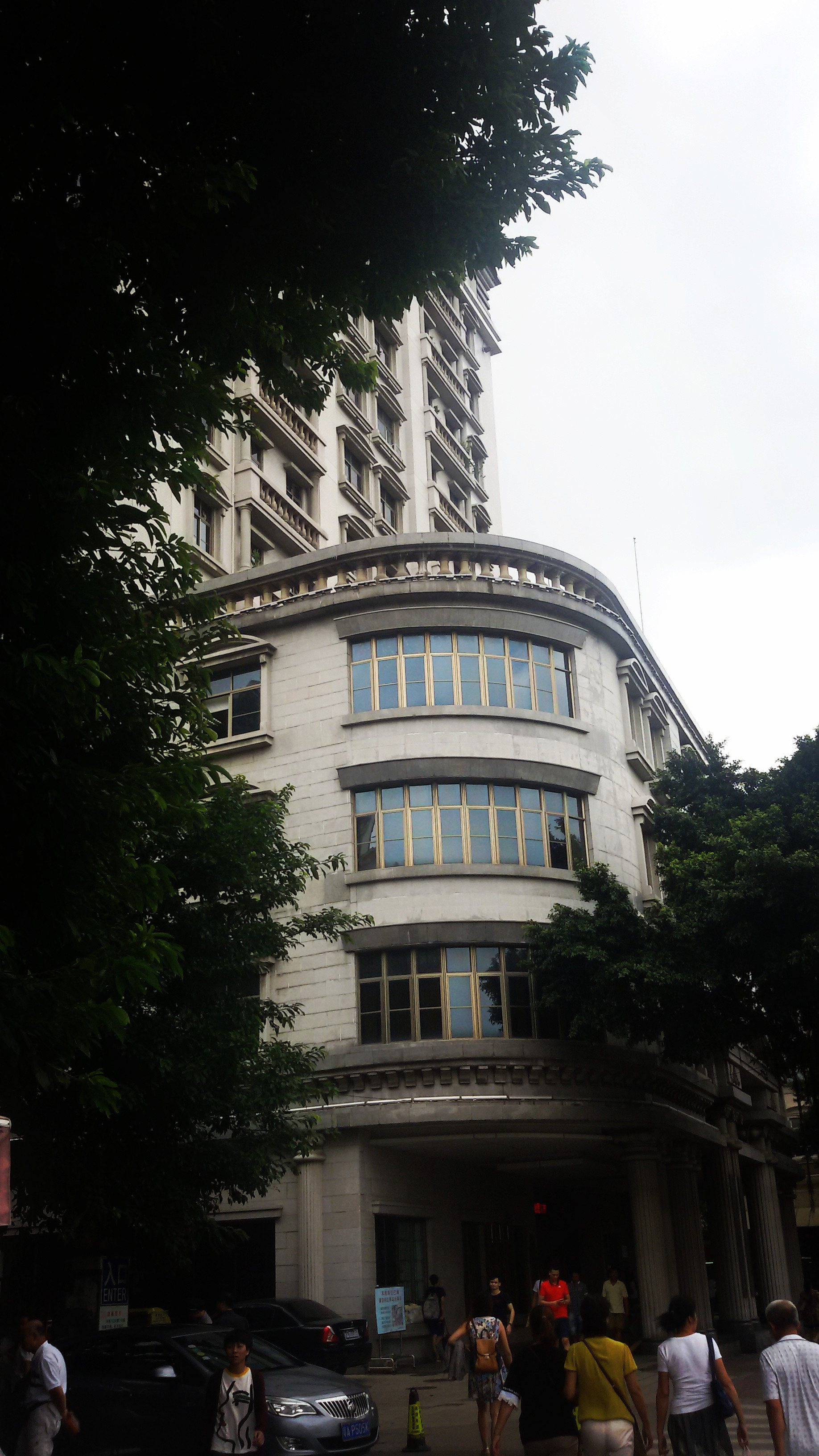 粵語: 广州市中医医院（六二三路總院）